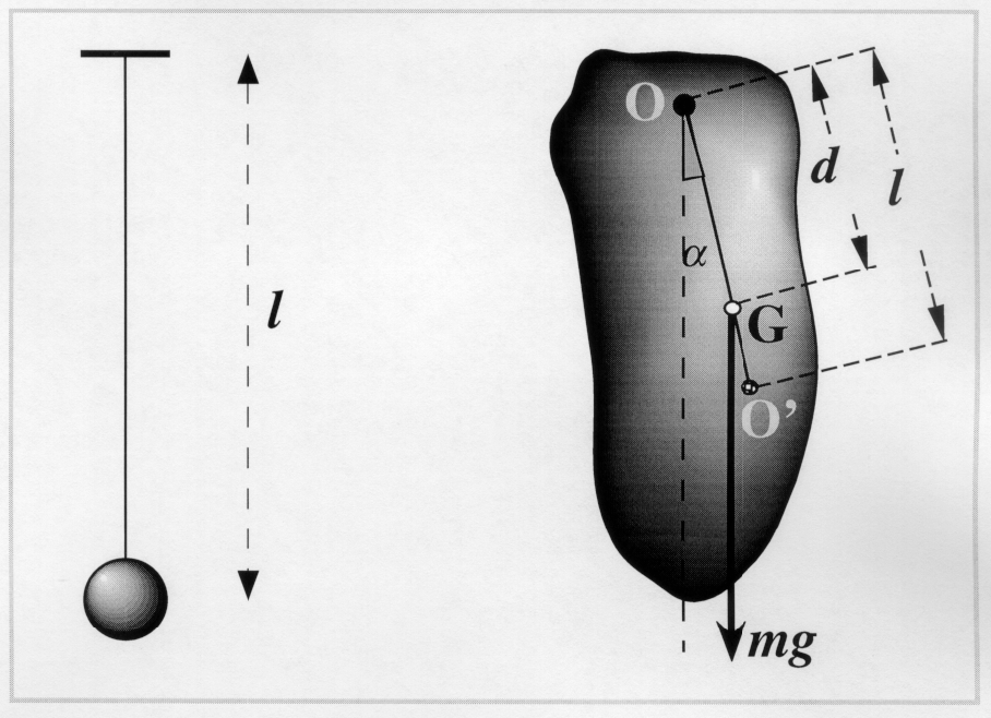 Pendule simple et pendule physique L'Utilisateur:Carlo denis est lui-même l'auteur de cette illustration et la met dans le domaine public.